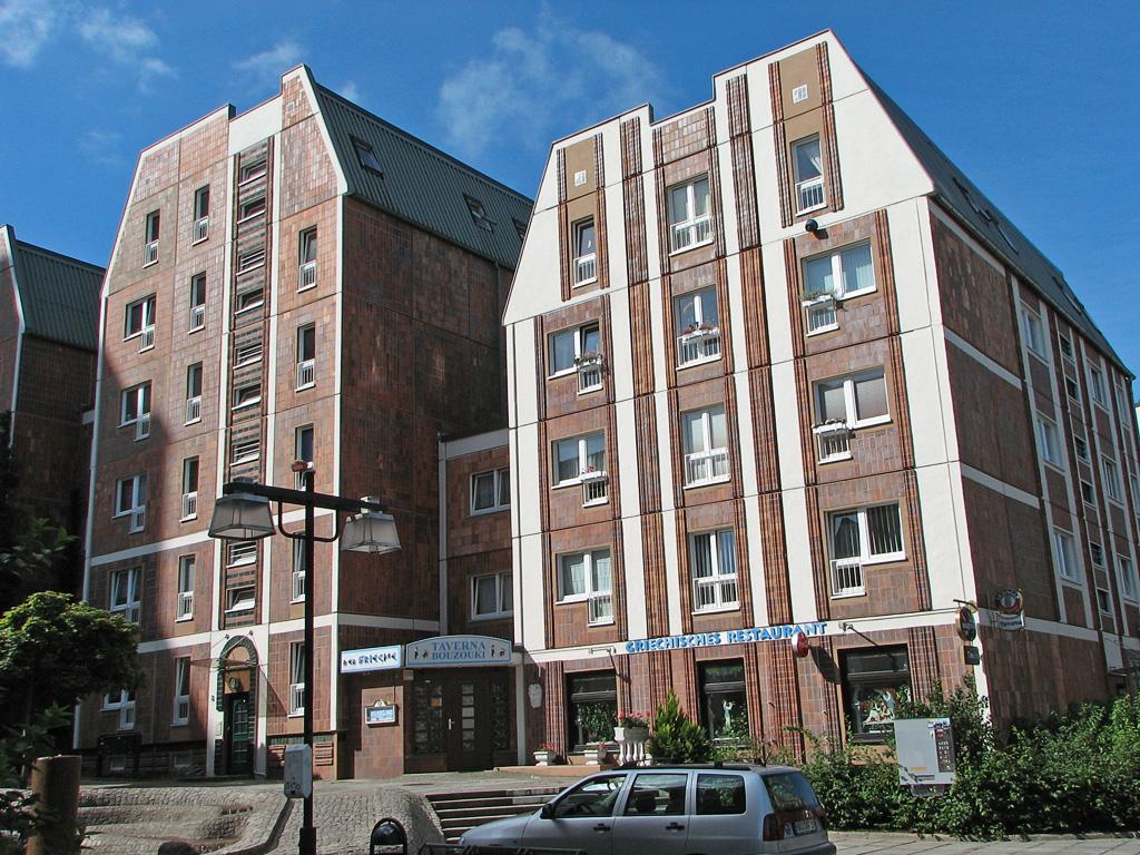 Beschreibung: typische Plattenbauten der Nördlichen Altstadt in Rostock / Germany Fotograf: Darkone, 17. August 2005